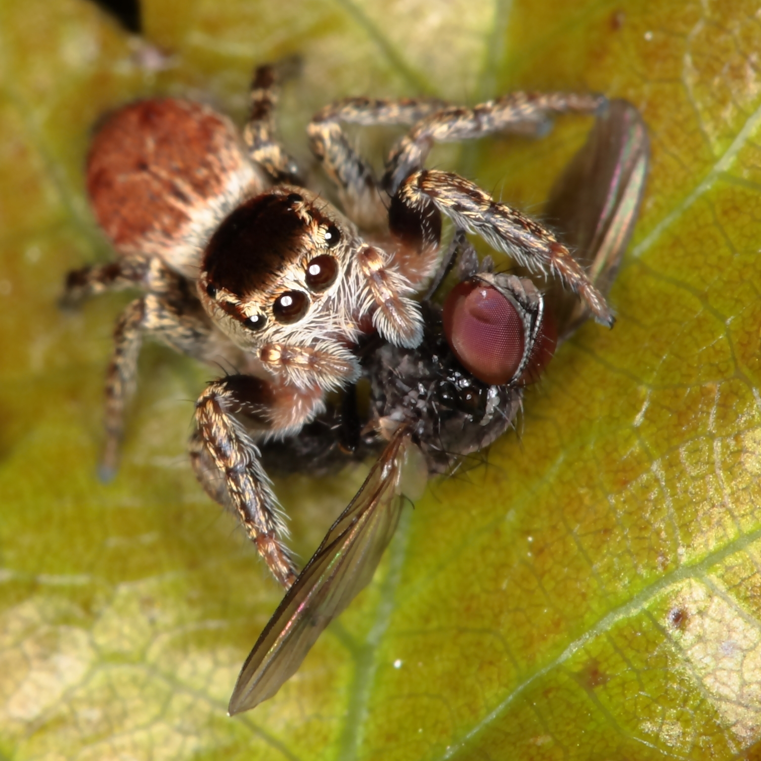 Evarcha falcata. Weibchen. Springspinne mit Beute Fundort: Sachsen, Waldrand, Sonnig, Eichblatt.